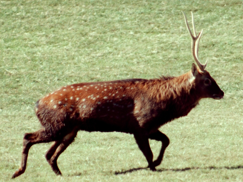 Sika Deer